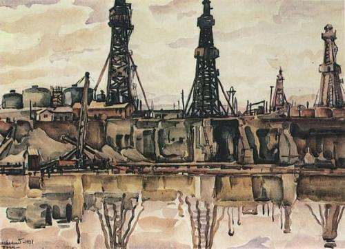 К.В. Богаевский. Баку. Нефтяные вышки. 1931